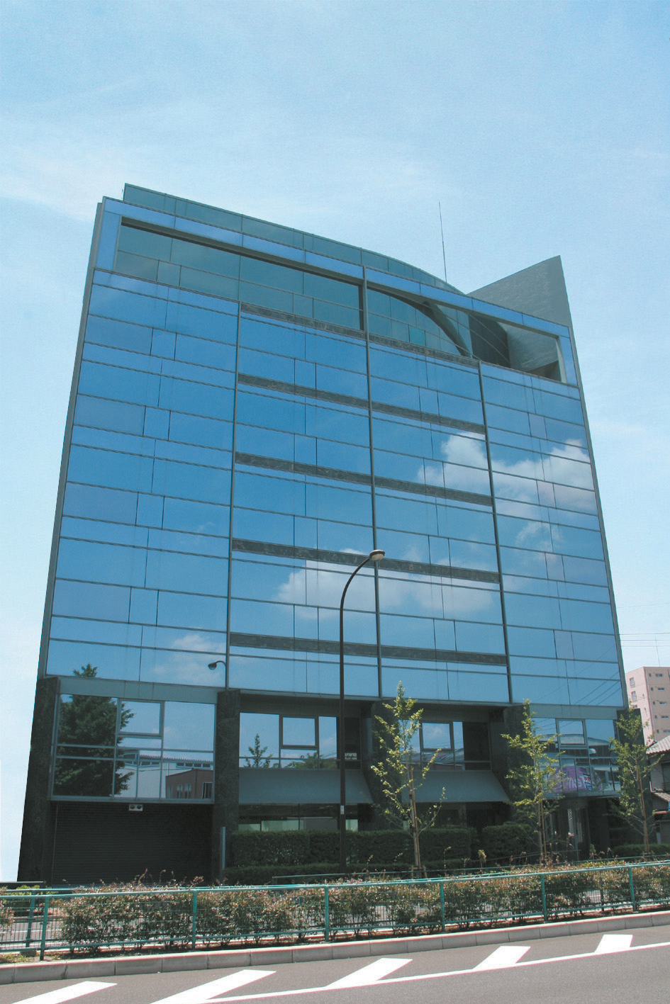 SL会社ビル